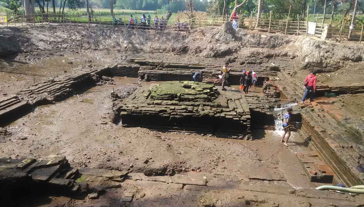 Situs Petirtaan Sumberbeji